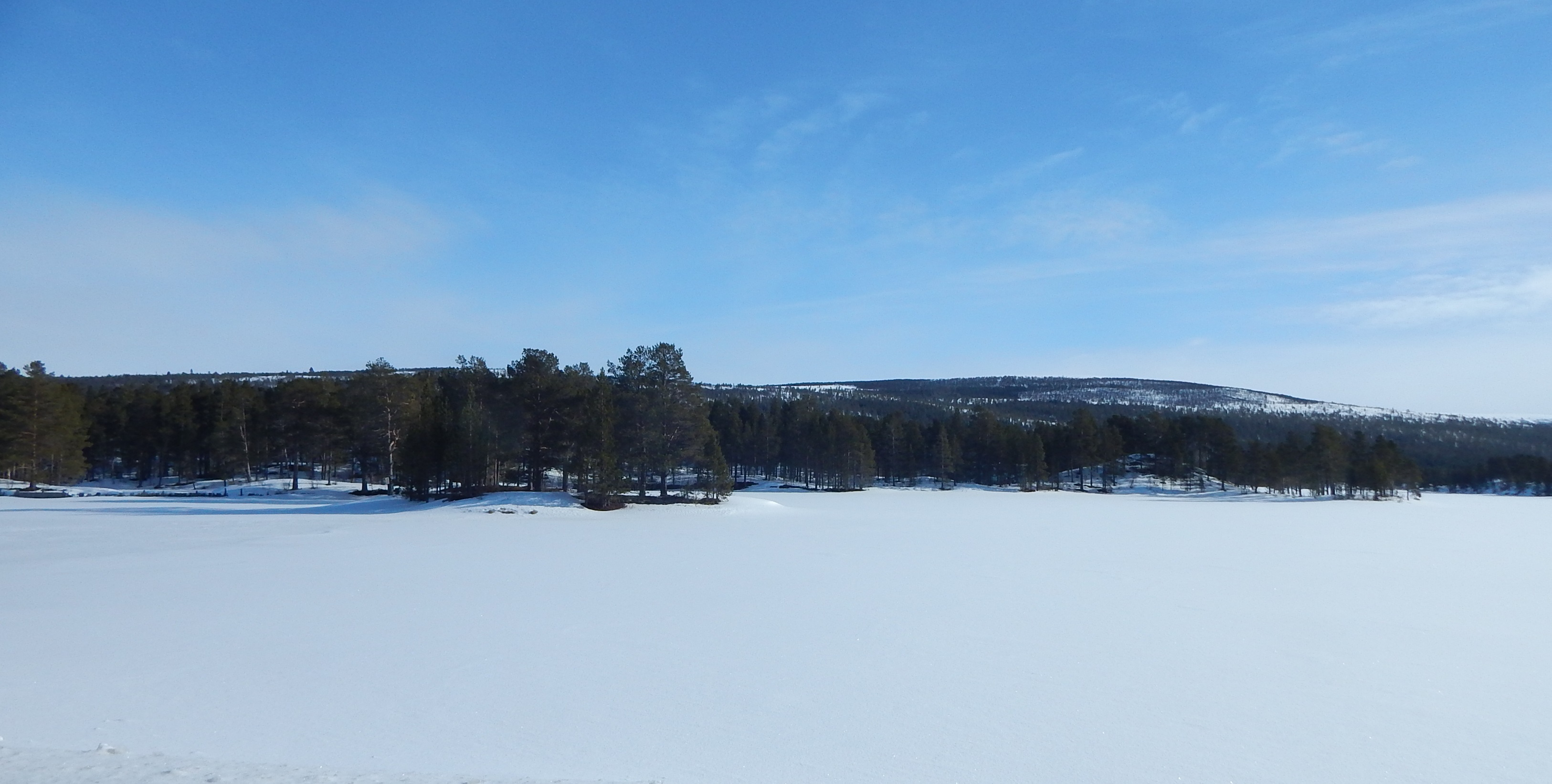 Rambergsjøen i Hådalen i Røros kommune, islagt i mars måned